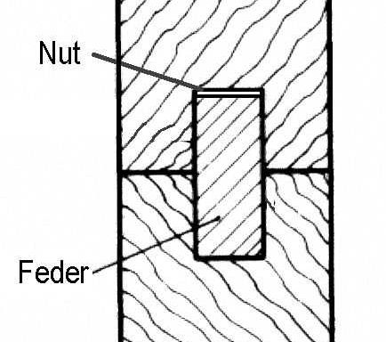 Nut-Feder-Verbindung, aus dem Holzgewerbe stammend